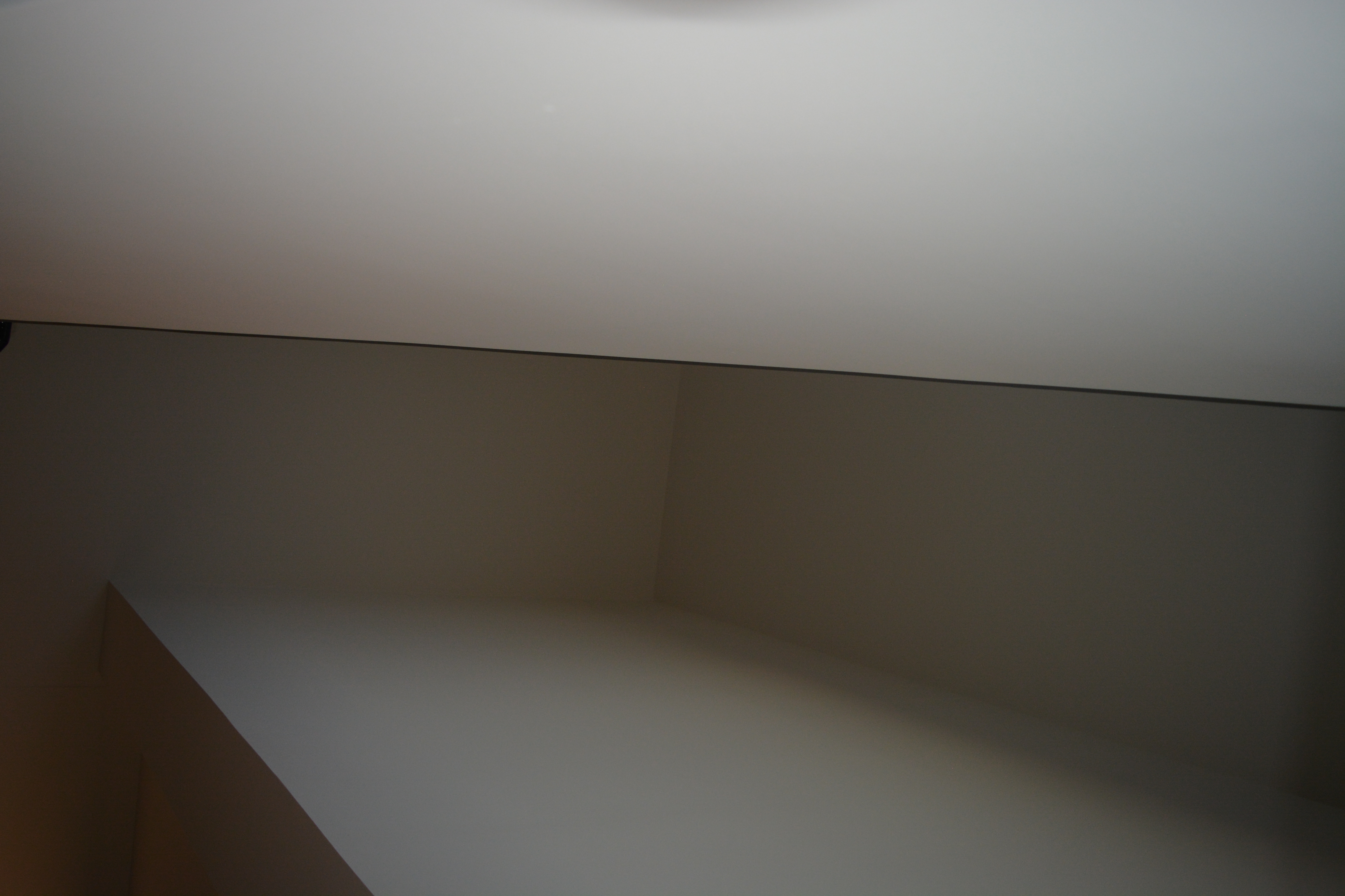 Durch Lichteinfall und Sonnenbestrahlung zu unterschiedlichen Tageszeiten verwandelt sich ein ansonsten kühler, sachlicher Raum wie eine Sinnestäuschung in etwas unvorhersehbares Neues.